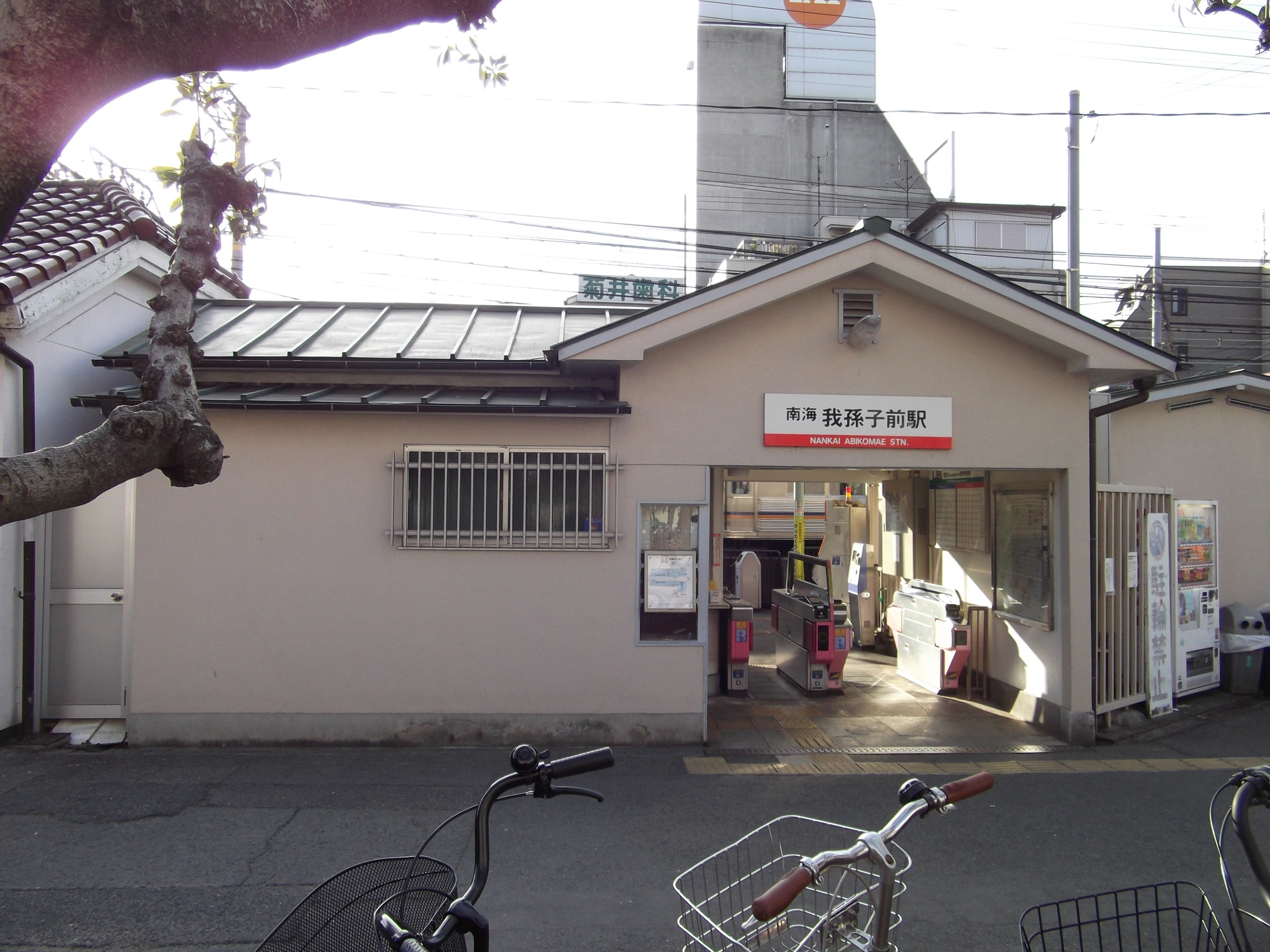 南海高野線我孫子前駅の下り駅舎